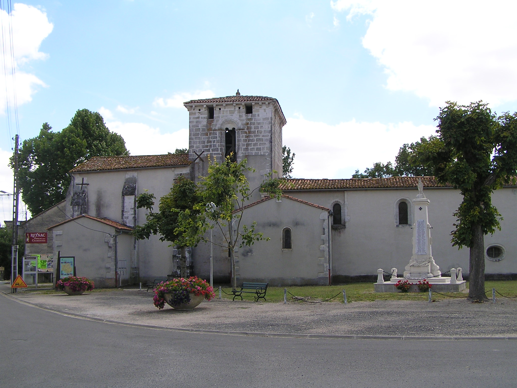 église de Guimps, prieuré St-Pierre, Charente, France